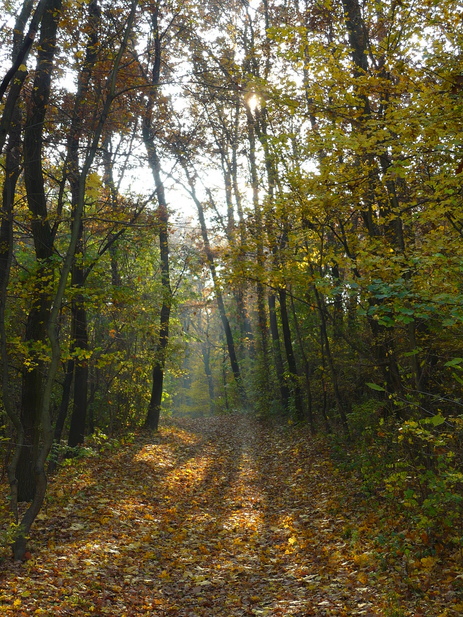 Kamaraerdő, Budapest, Hungary